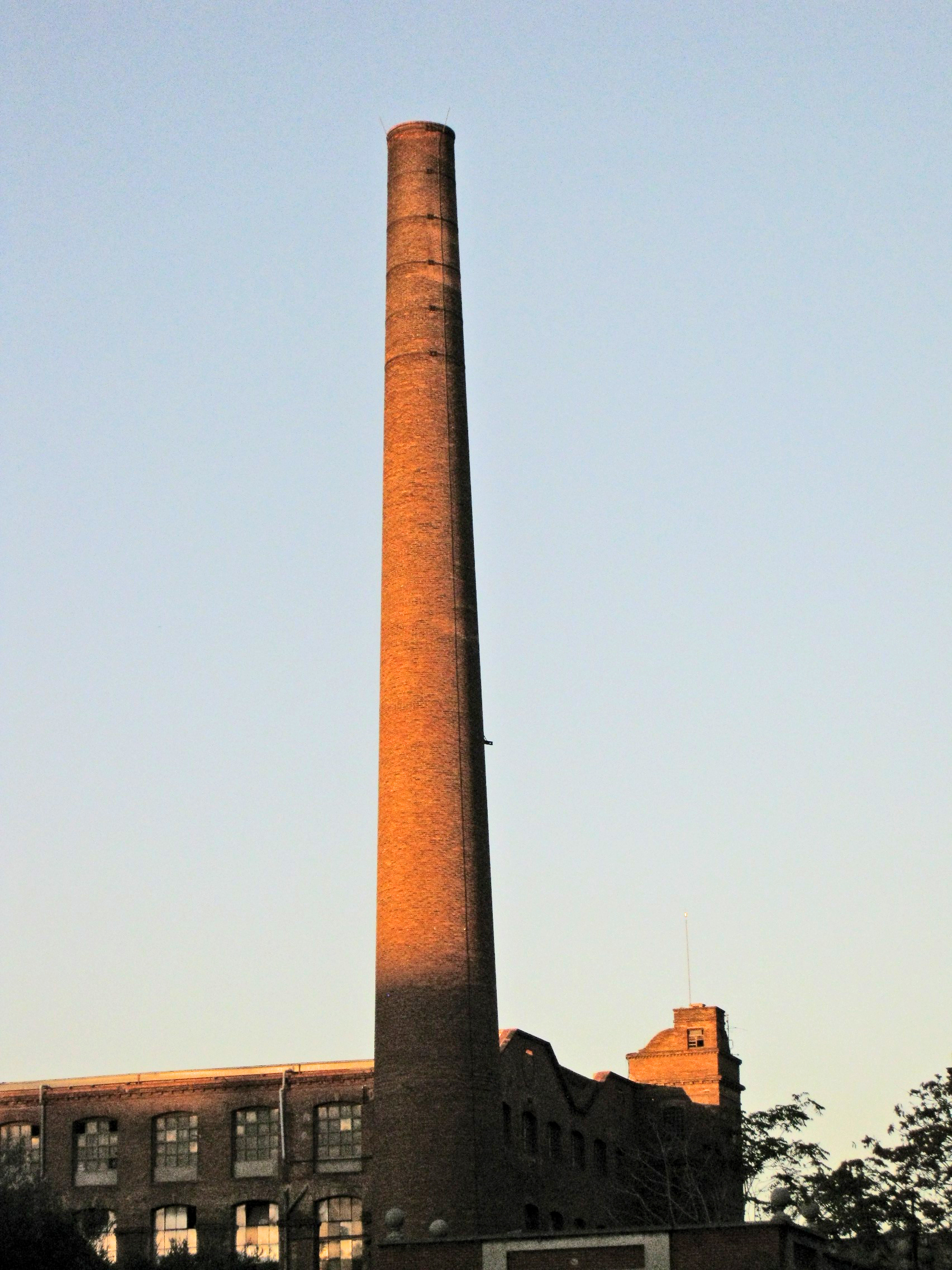 Xemeneia de l'antiga fàbrica de Can Batlló (1877-78), a la Gran Via de les Corts Catalanes núm. 159-179, al barri de la Bordeta (Barcelona).